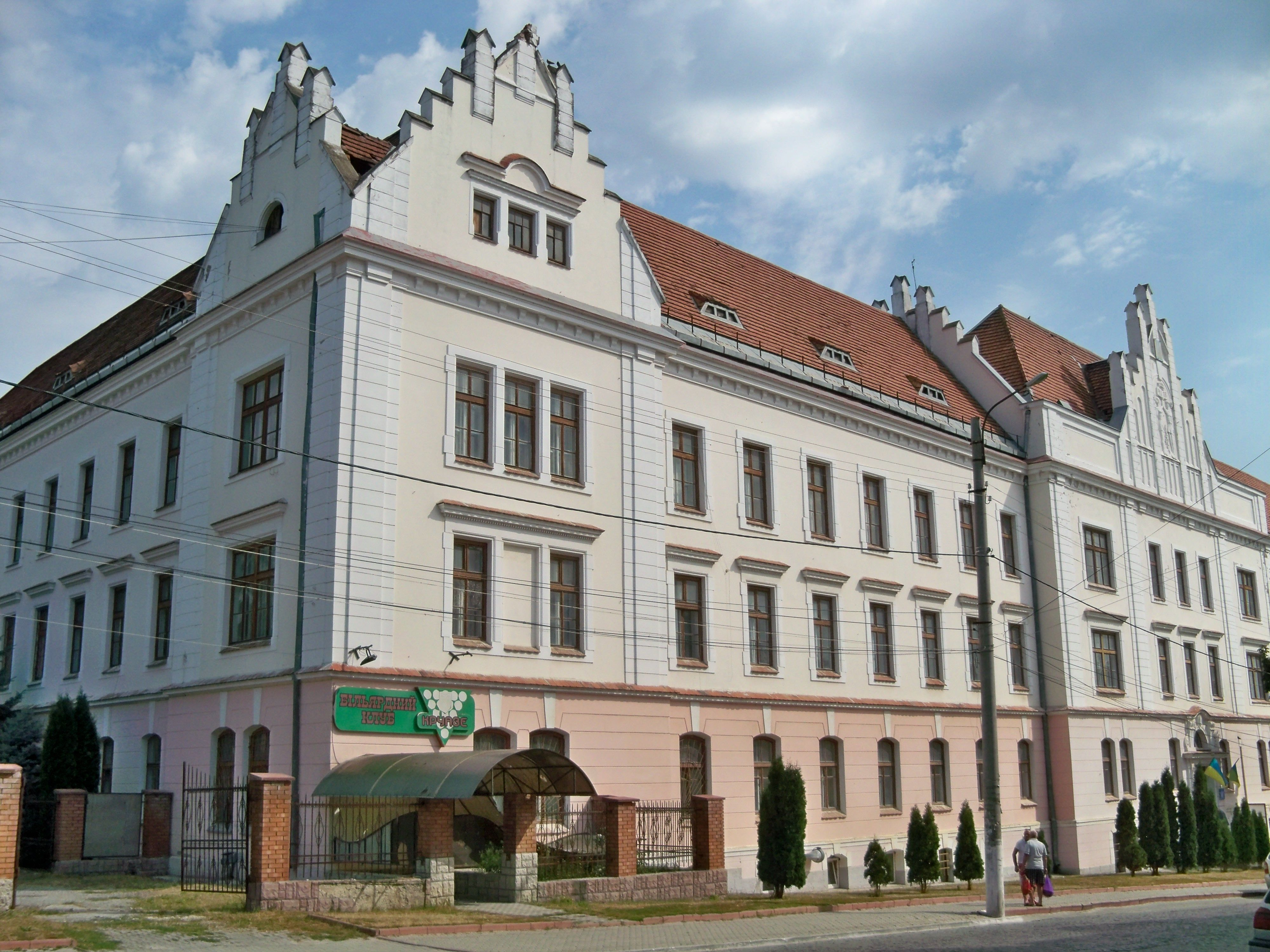 Споруда повітового суду(мур.), Чортків, вул.Ст.Бандери,46